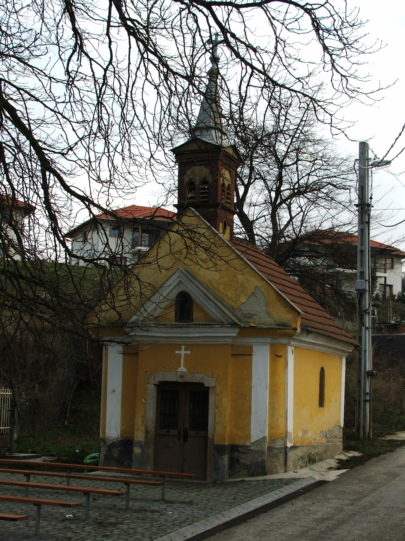 Szentjánoskúti-kápolna, Esztergom, Hungary